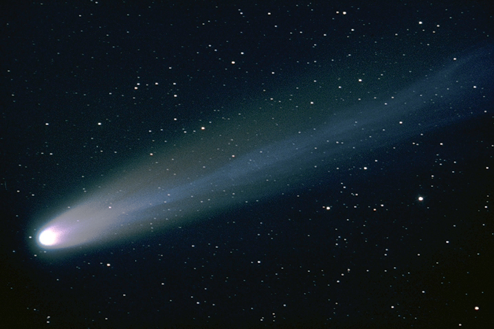 Komet Hyakutake im Jahr 1996 fotografiert von Franz Haar an der vhs-Sternwarte Neumünster